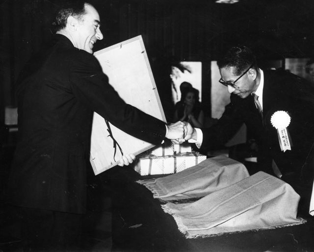 Tokio 1972. Roberto Michelucci riceve il Disco D'oro per il superamento del milione di copie vendute dalla casa discografica Philips delle 4 Stagioni di A. Vivaldi.